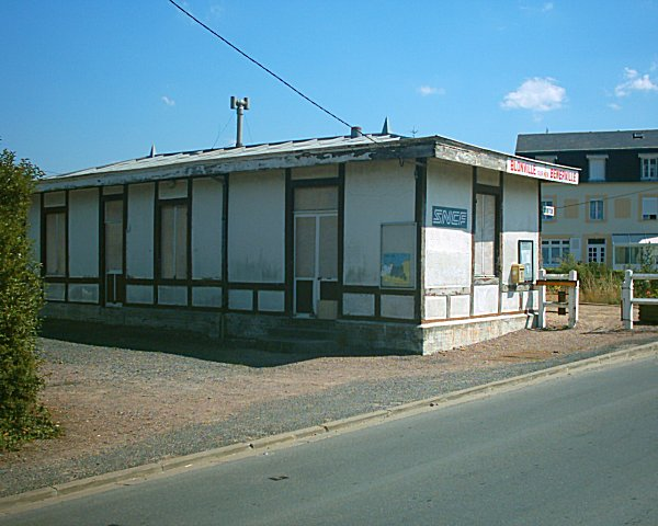 Gare de Blonville-sur-Mer-Benerville, Blonville-sur-Mer in 2005.